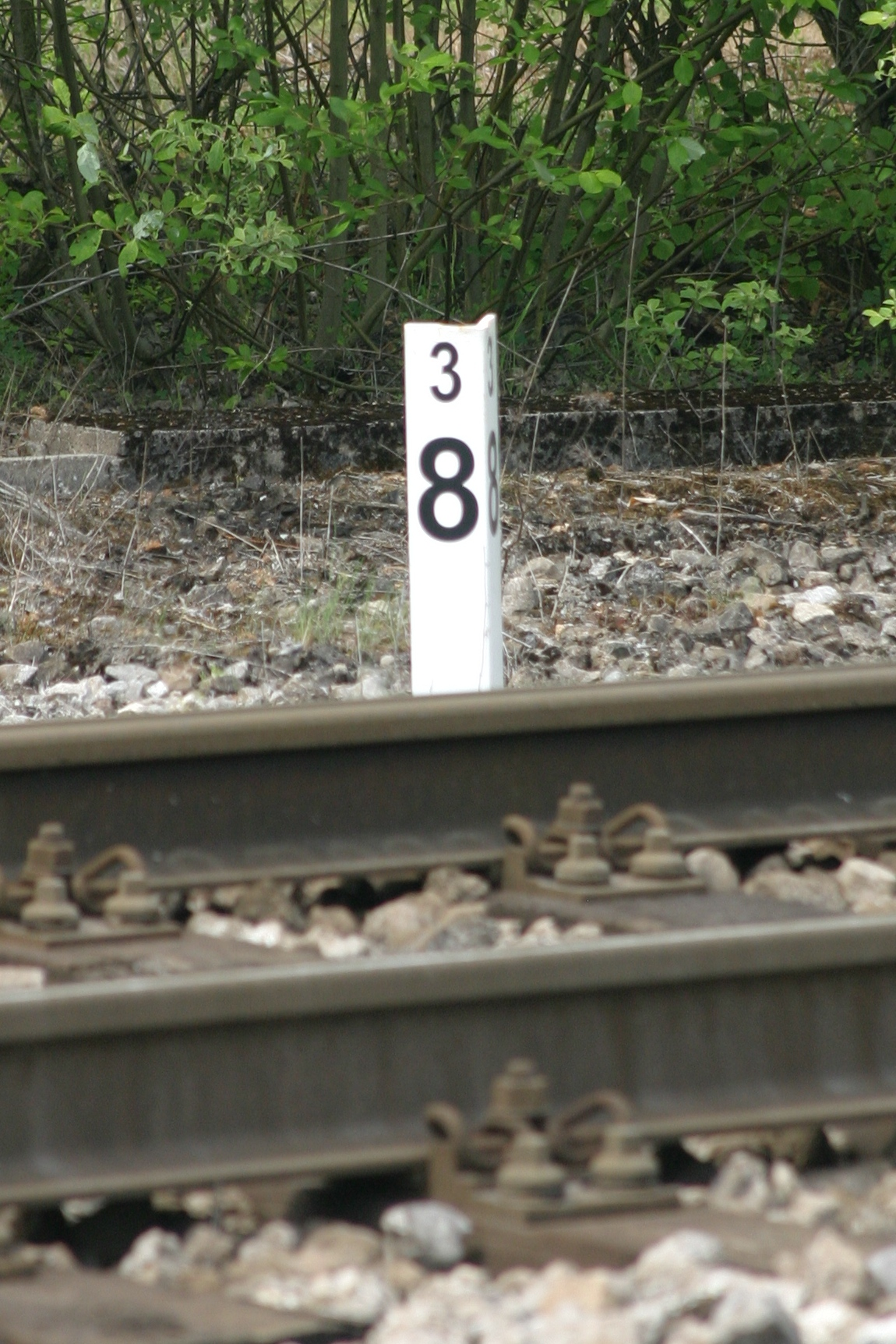 100 Metermaarken op der Eisebunn.